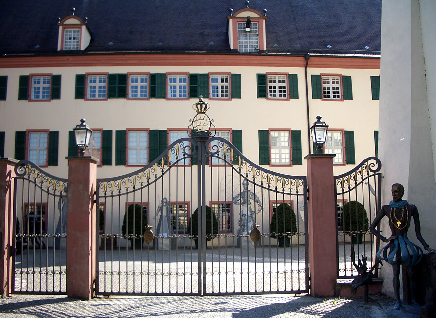 Altshausen, Germany: Schloss, Neues Schloss mit Skulpturen von Diane Herzogin von Württemberg